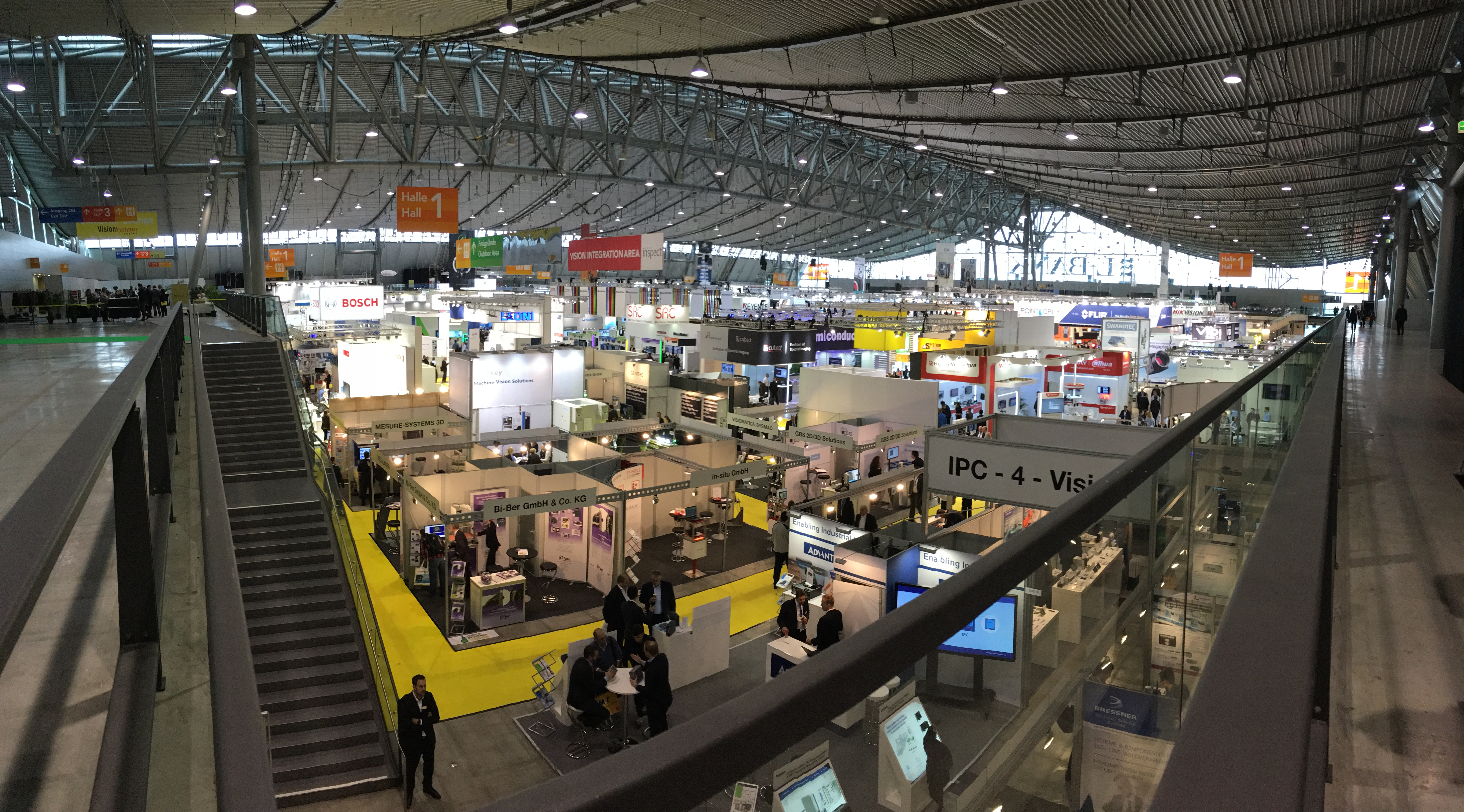 Blick auf die Vision Messe 2016 in Stuttgart.